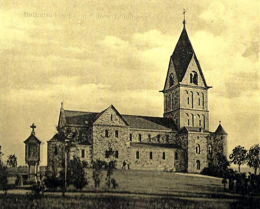 Salvatorkirche in Aachen auf dem Salvatorberg, um 1900, kurz nach dem Neubau.